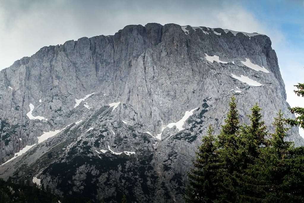 Kärnten: Blick auf den Trogkofel aus Richtung Sonnleitn